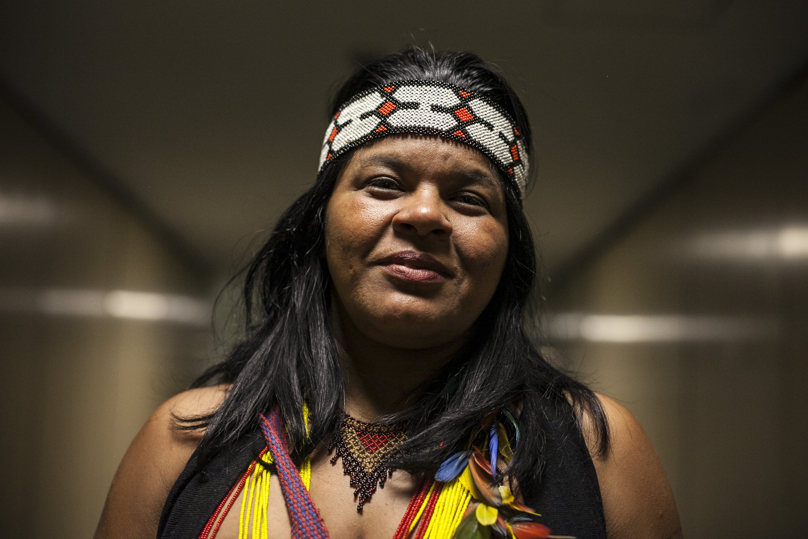 Sônia Guajajara • 19/05/2015 • Brasília (DF) Sônia Bone Guajajara (Terra Indígena Araribóia, Maranhão, 1974) é uma líder indígena brasileira Sua militância em ocupações e protestos levou-a à coordenação executiva da Articulação dos Povos Indígenas do Brasil (Apib) e da Coordenação das Organizações Indígenas da Amazônia Brasileira (Coiab). É formada em Letras e em Enfermagem. Recebeu em 2015 a Ordem do Mérito Cultural. Foto: Mídia NINJA